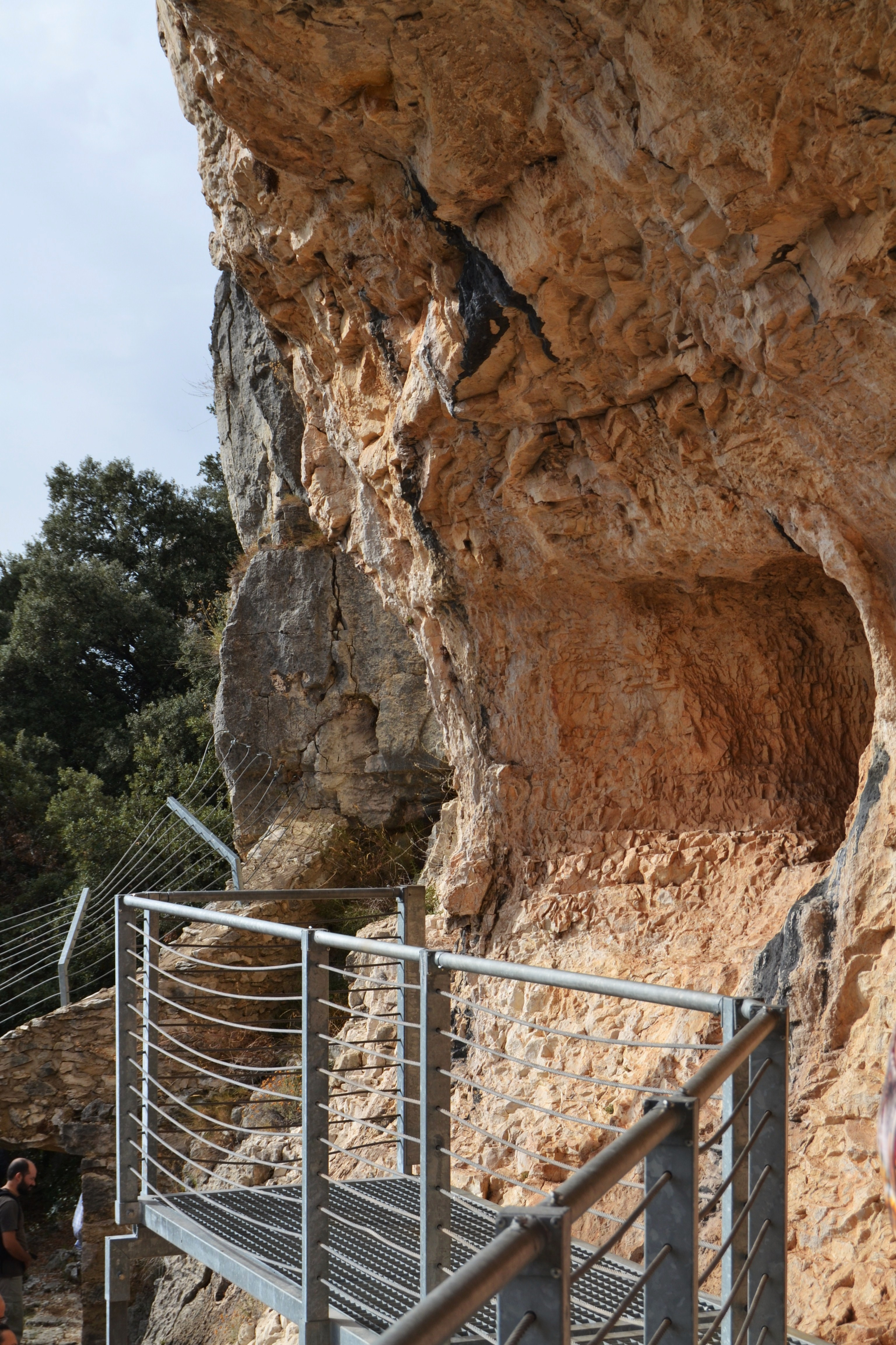 Cova Remígia i barana, Ares del Maestrat.